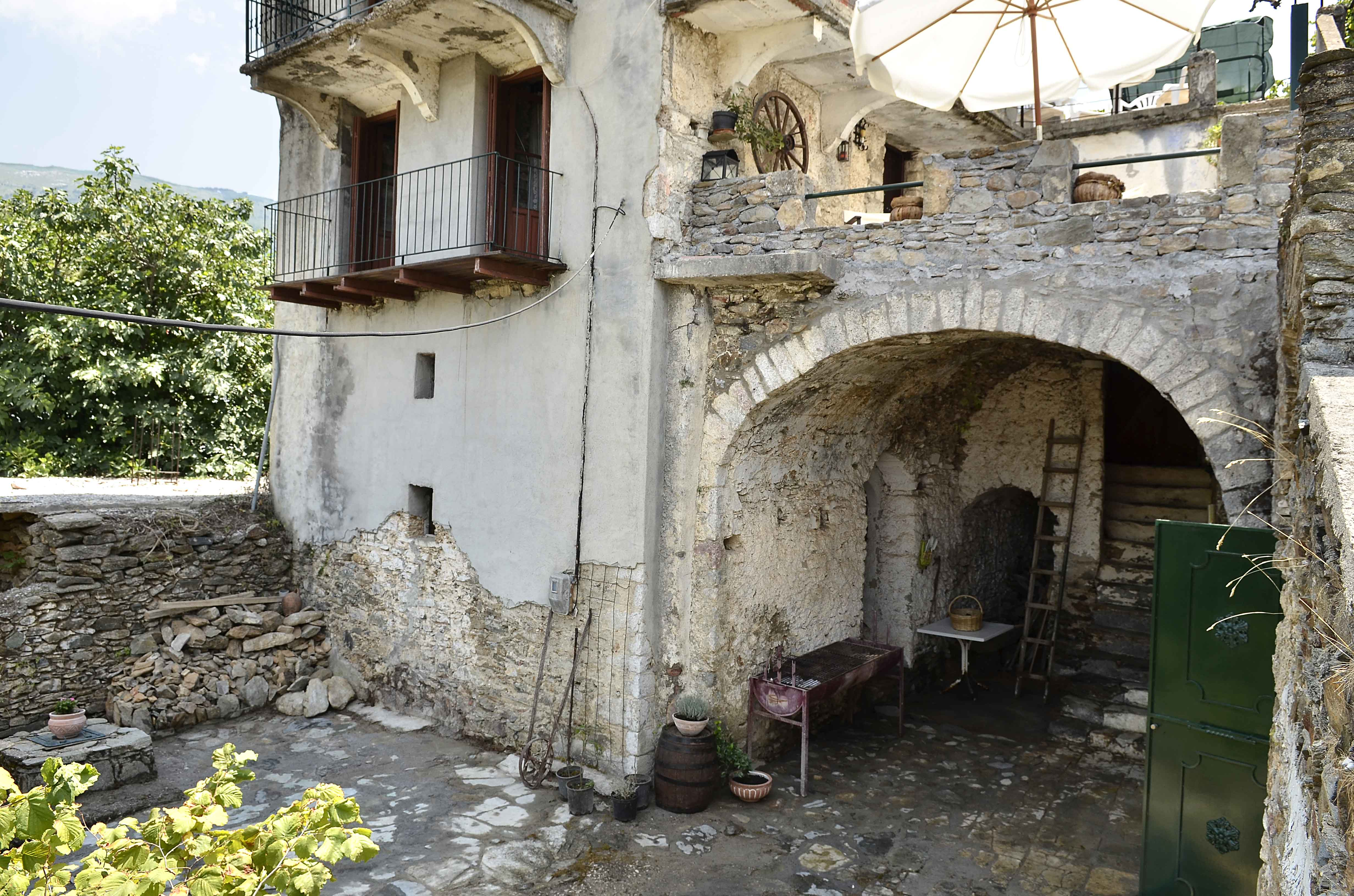 Εξωτερική άποψη απο τον πέτρινο μαντρότοιχο.Κατάλογος Κάστρων Νομού Μεσσηνίας